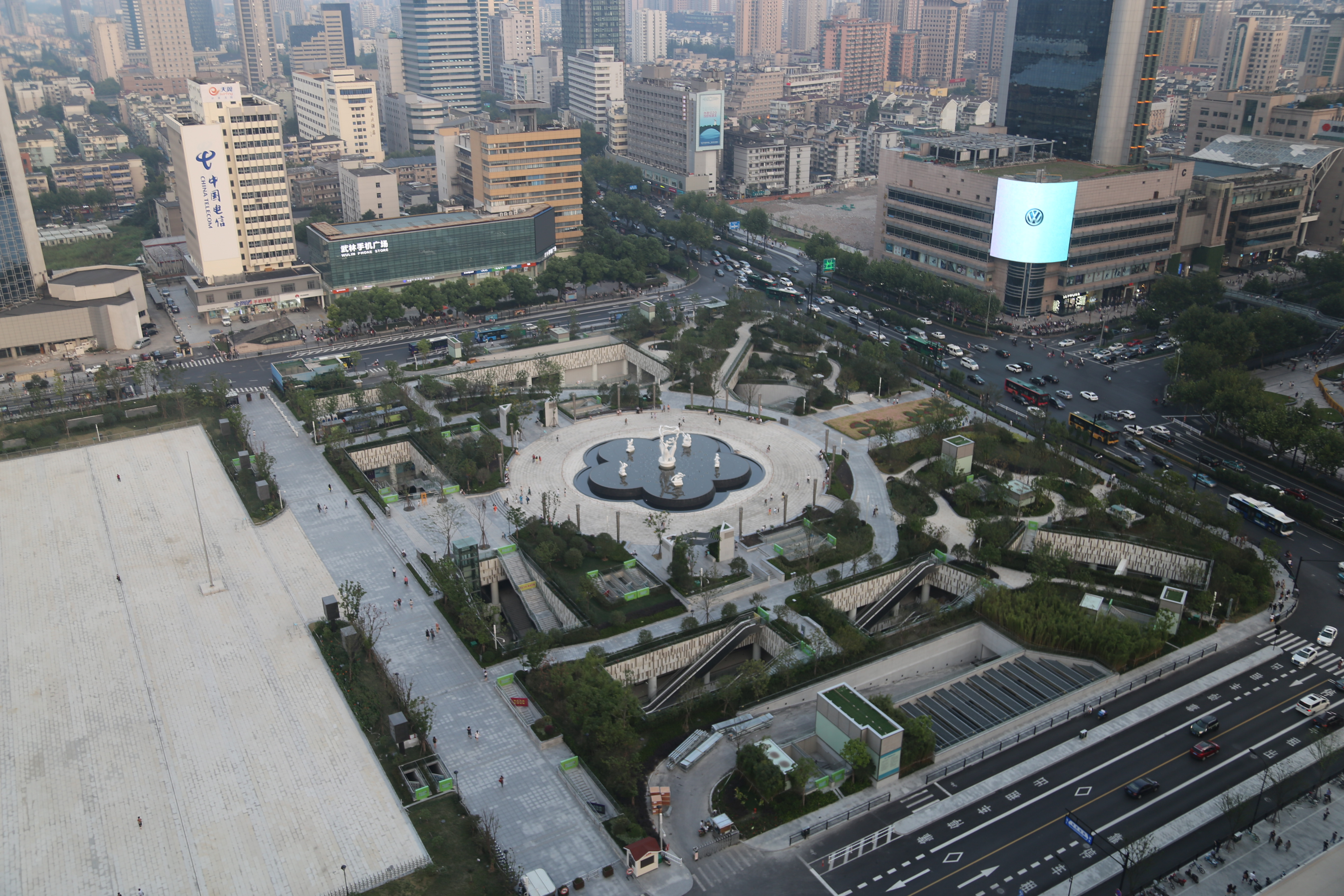 杭州大厦顶部观看武林广场，2016年9月